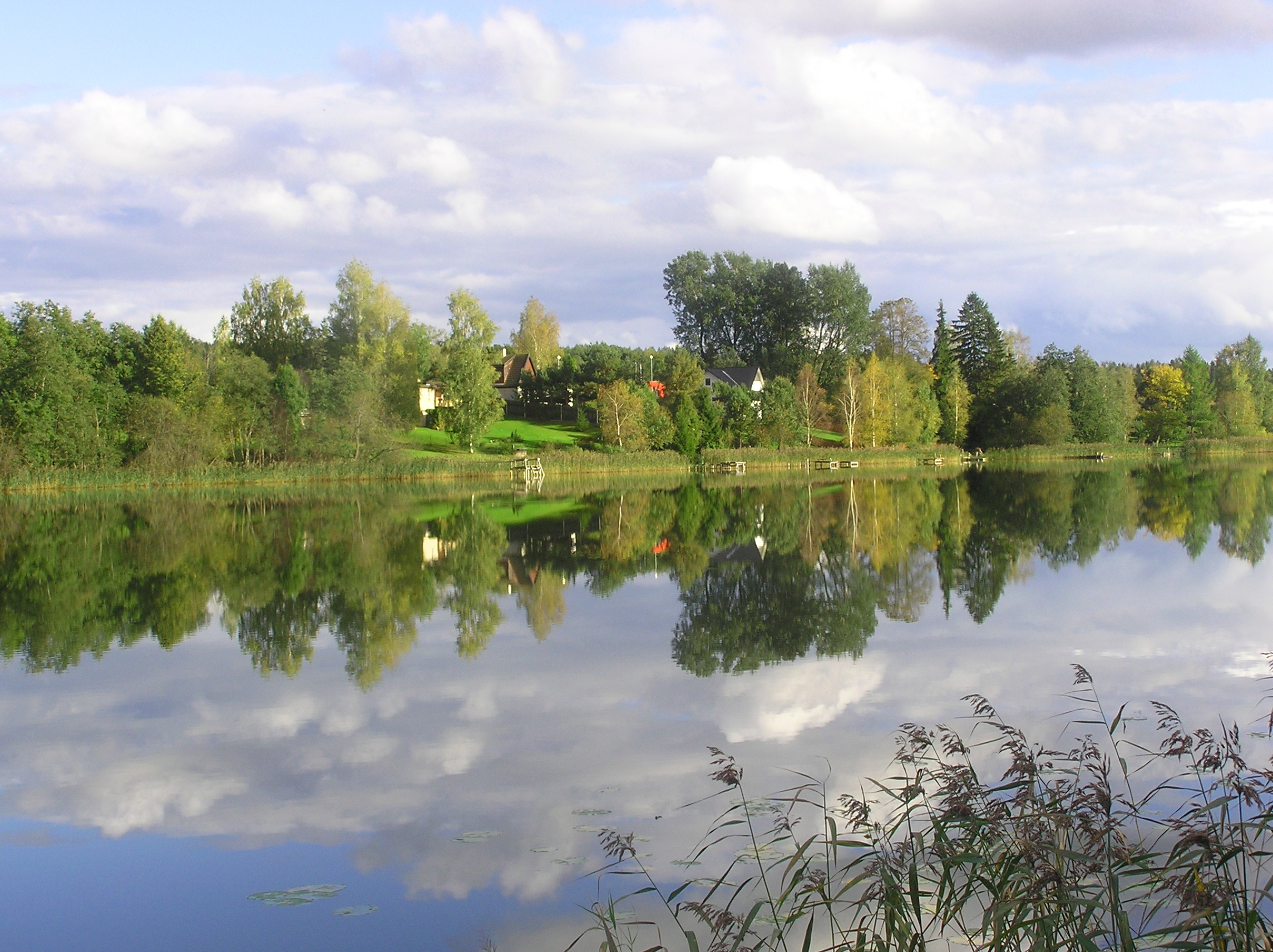 Vaade Agali järvele